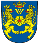 Znak města Jindřichův Hradec